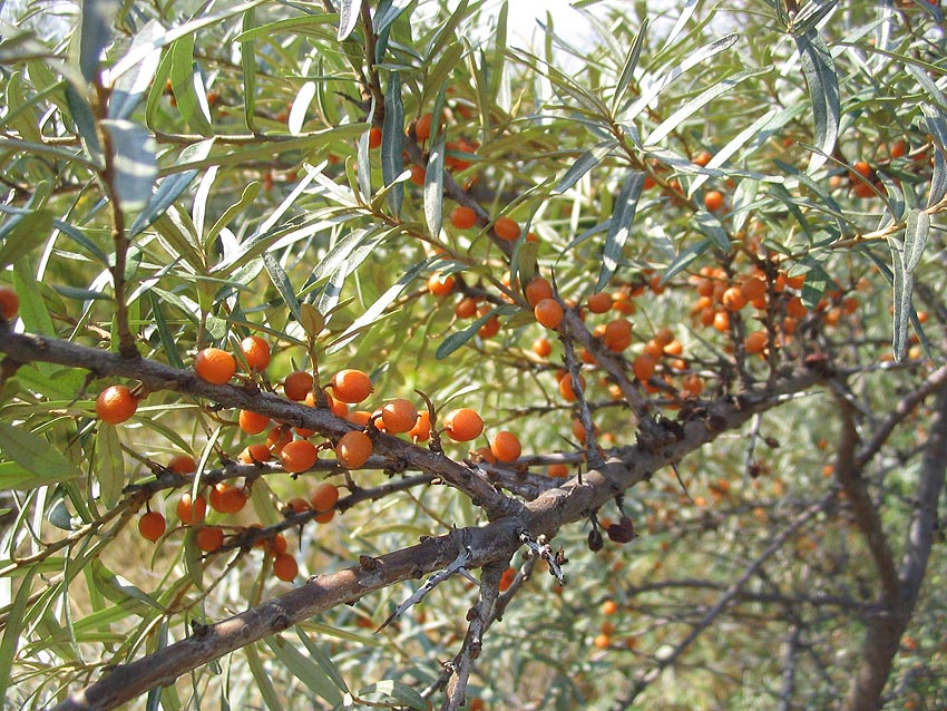 Hippophae rhamnoides, photo prise à Ille-sur-Têt (France)